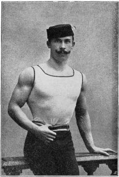 Viktor Murnik